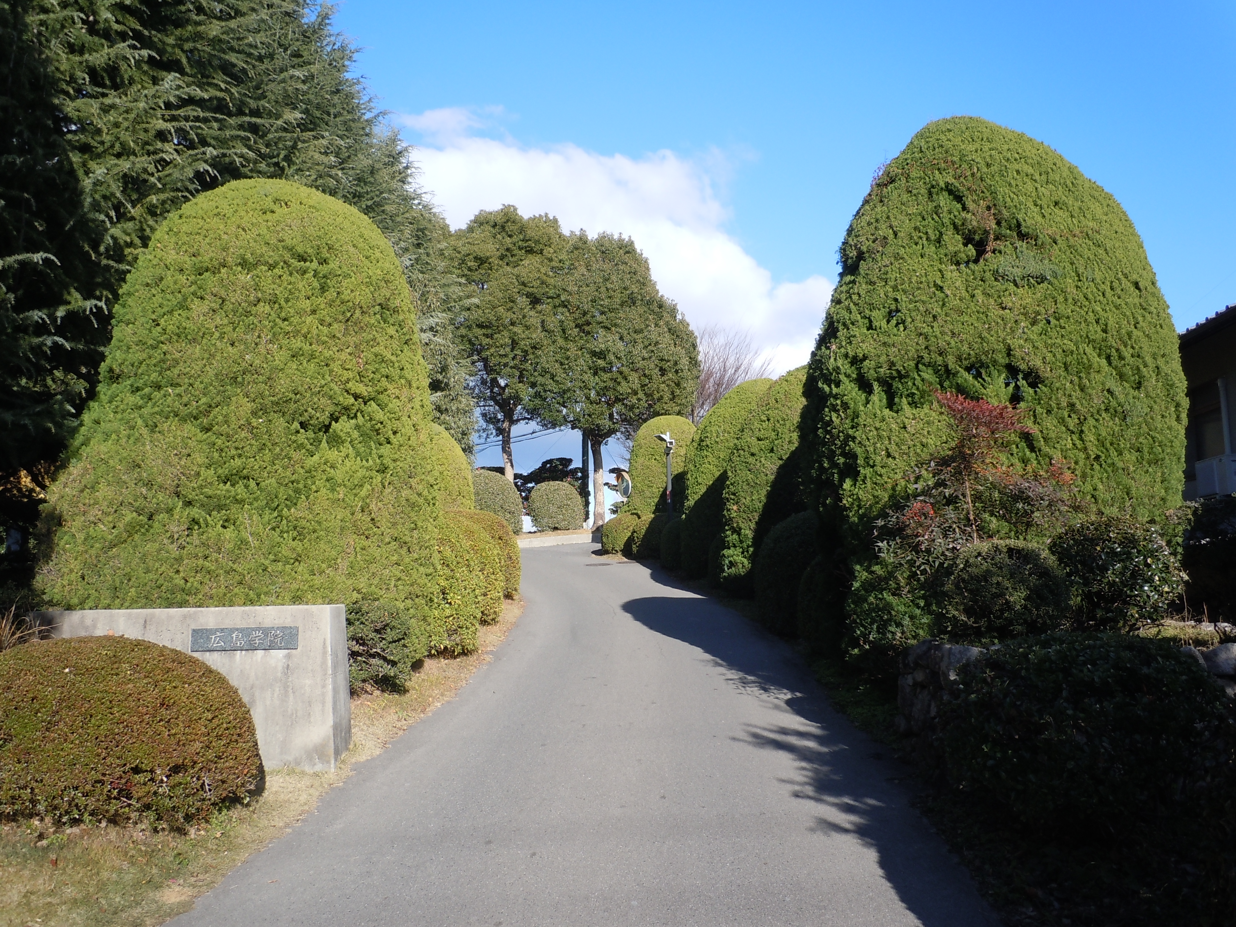 広島学院正門。